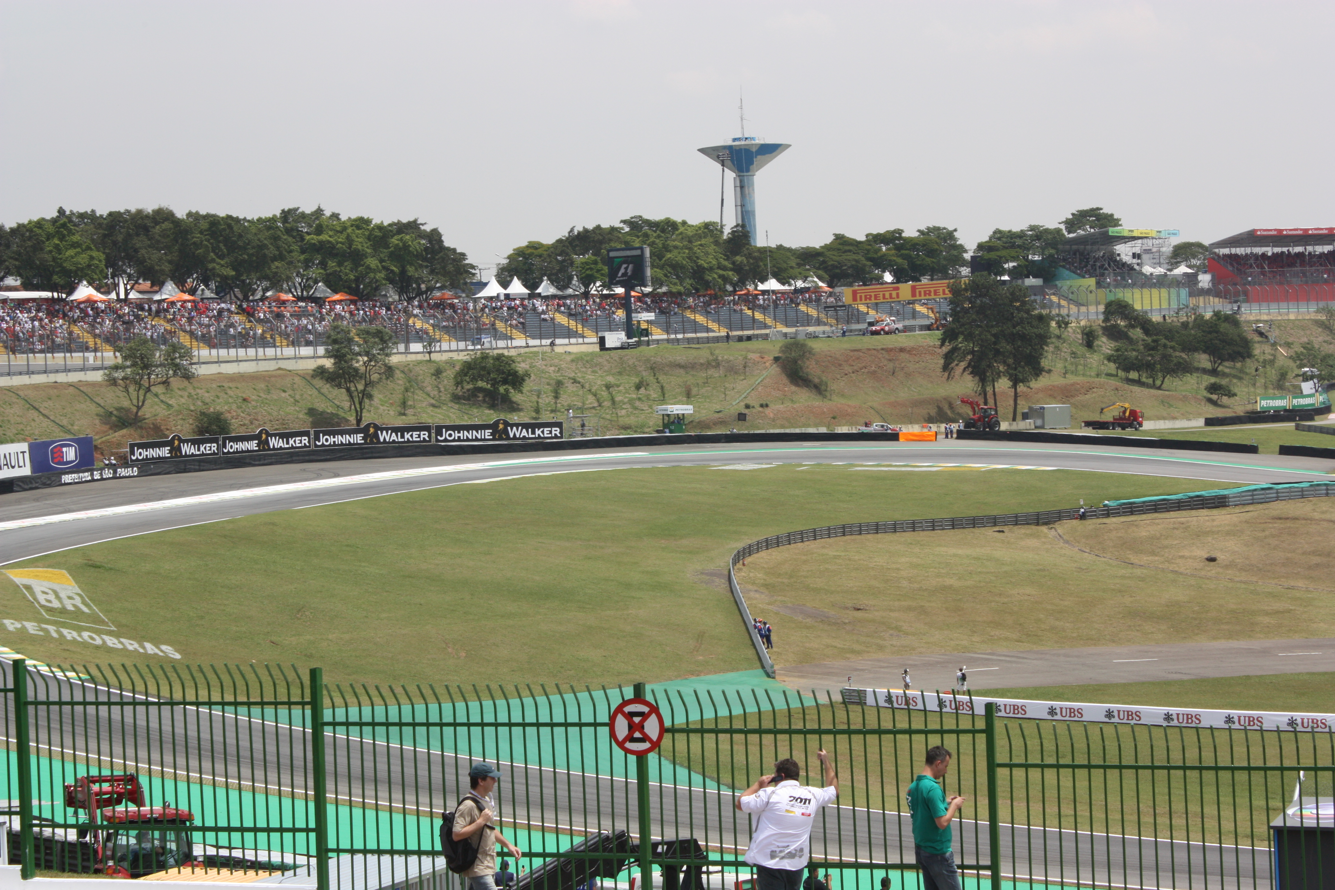 Vista da parte baixa da pista